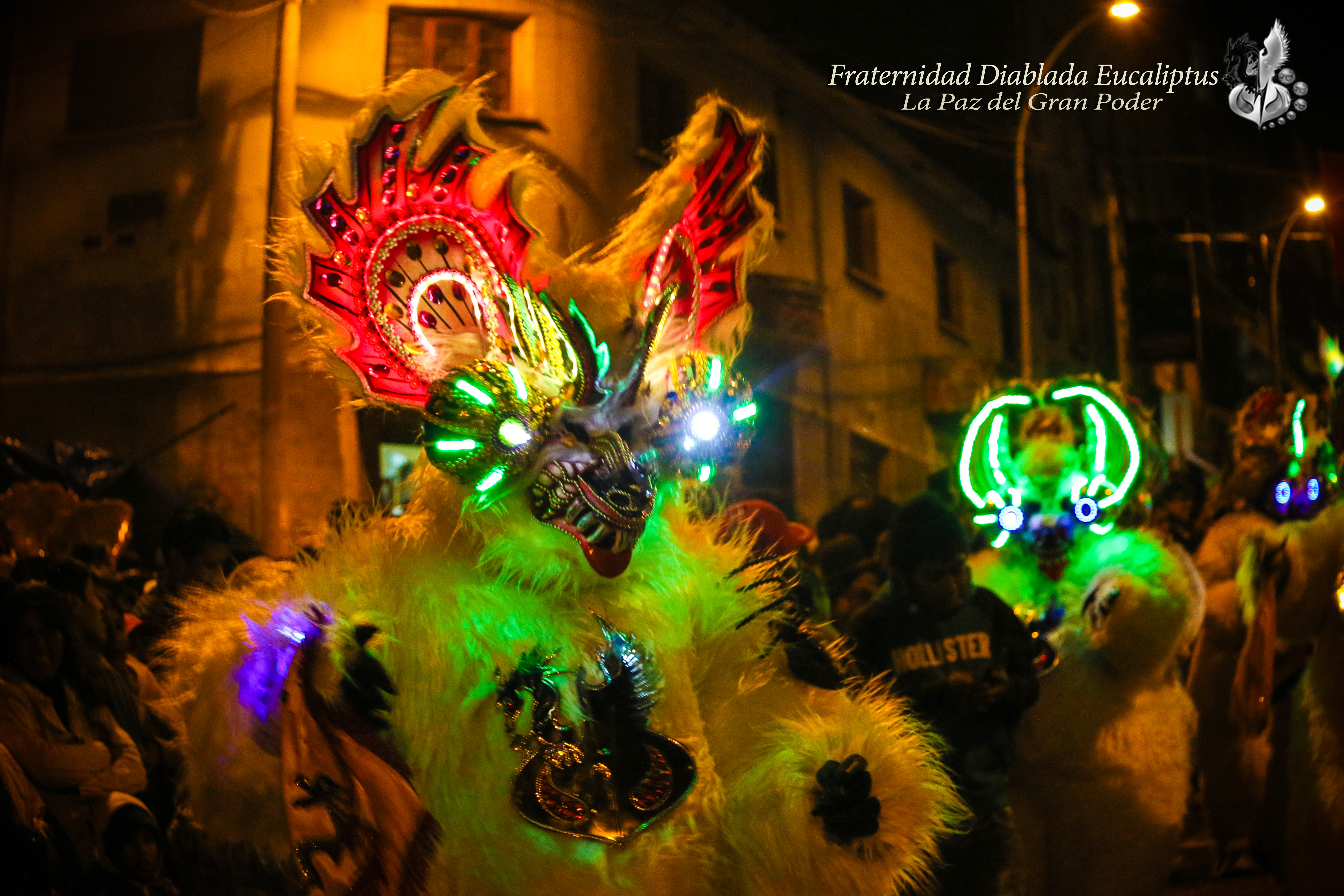 la muerte, uno de los personajes de la diablada